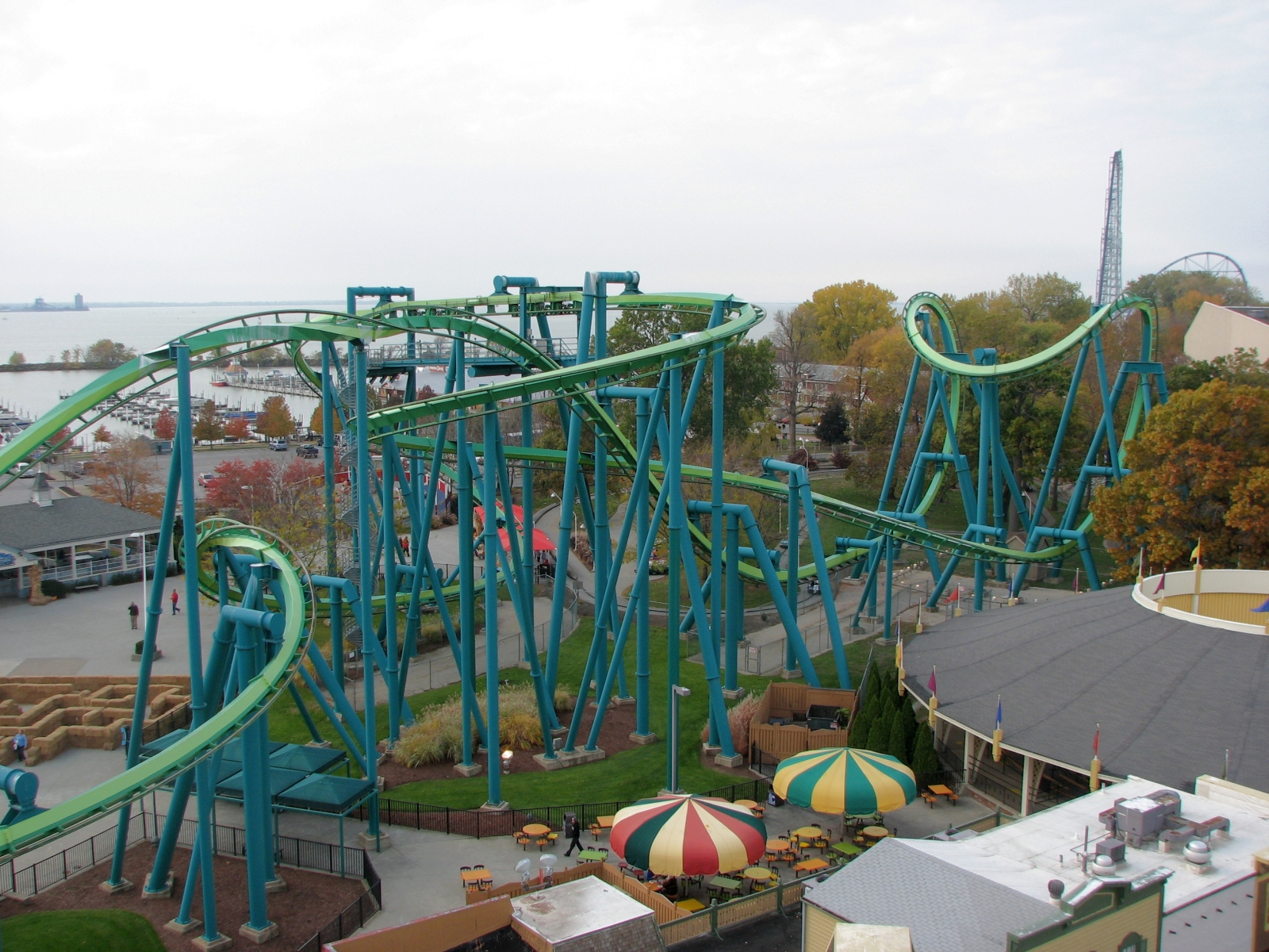 Raptor again